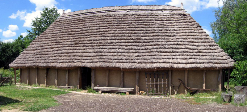 Das Wohnstallhaus nordgermanischer Bauweise, auf dem Gelände des Alamannen-Museum Vörstetten.